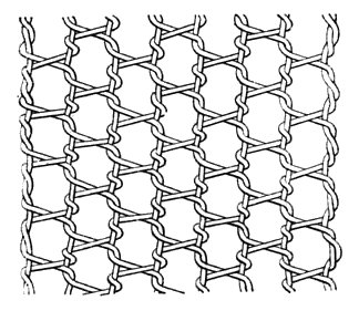 Bobinet